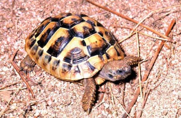 Testudo hermanni (Griechische Landschildkröte) auf Mallorca